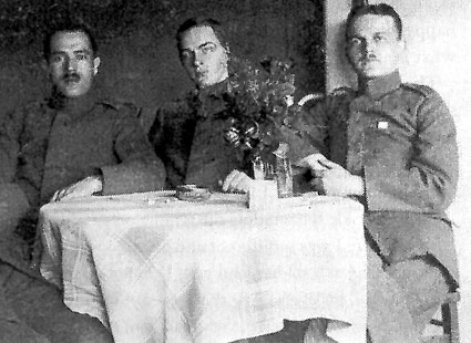 Ремарк (в средата) с фронтови другари.